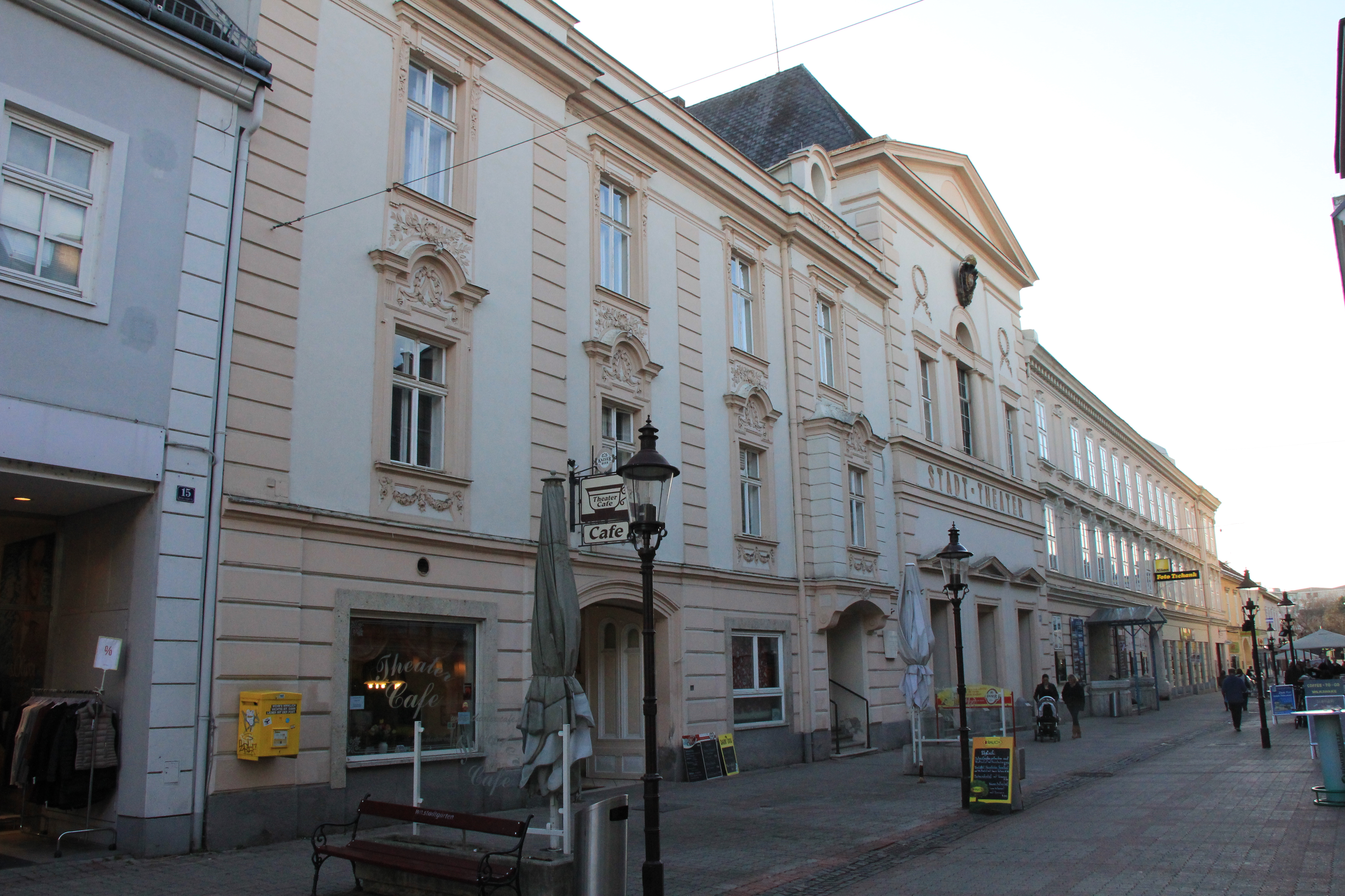 Stadttheater in Wiener Neustadt